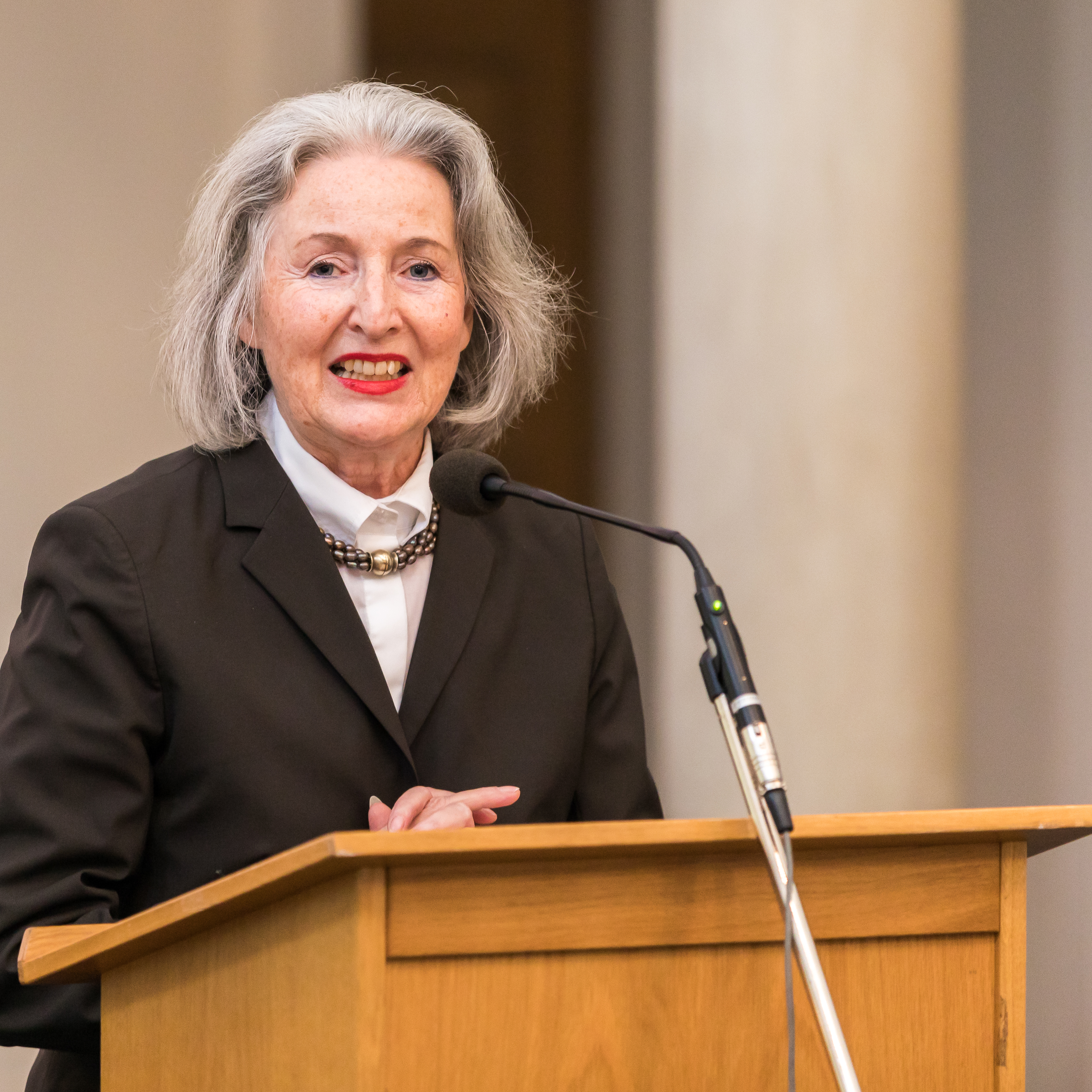 Historisches Archiv der Stadt Köln: Ausstellungseröffnung „einFLUSSreich. Köln und seine Häfen“ in der Trinitatiskirche Köln Foto: Vortrag „Wandel und Zukunft der Kölner Häfen“ durch Anne Luise Müller, Leiterin des Stadtplanungsamtes der Stadt Köln